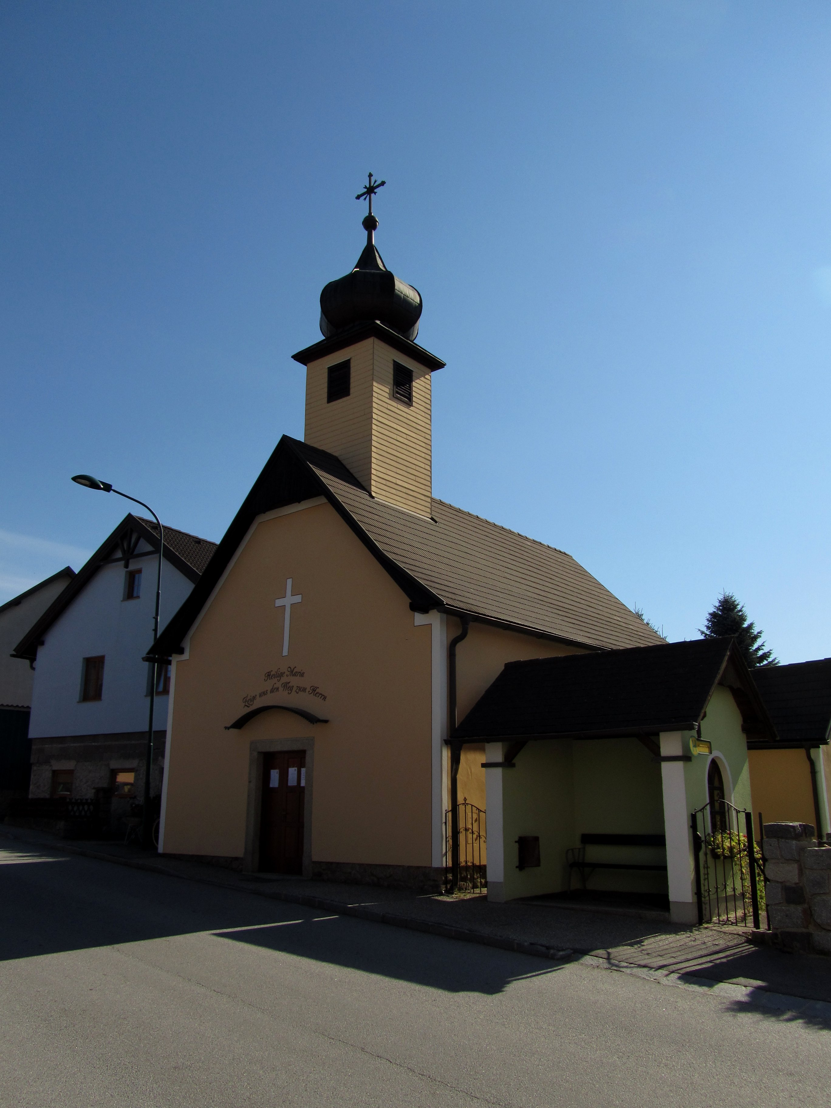 Ortskapelle Zur Himmelfahrt Unserer Lieben Frau